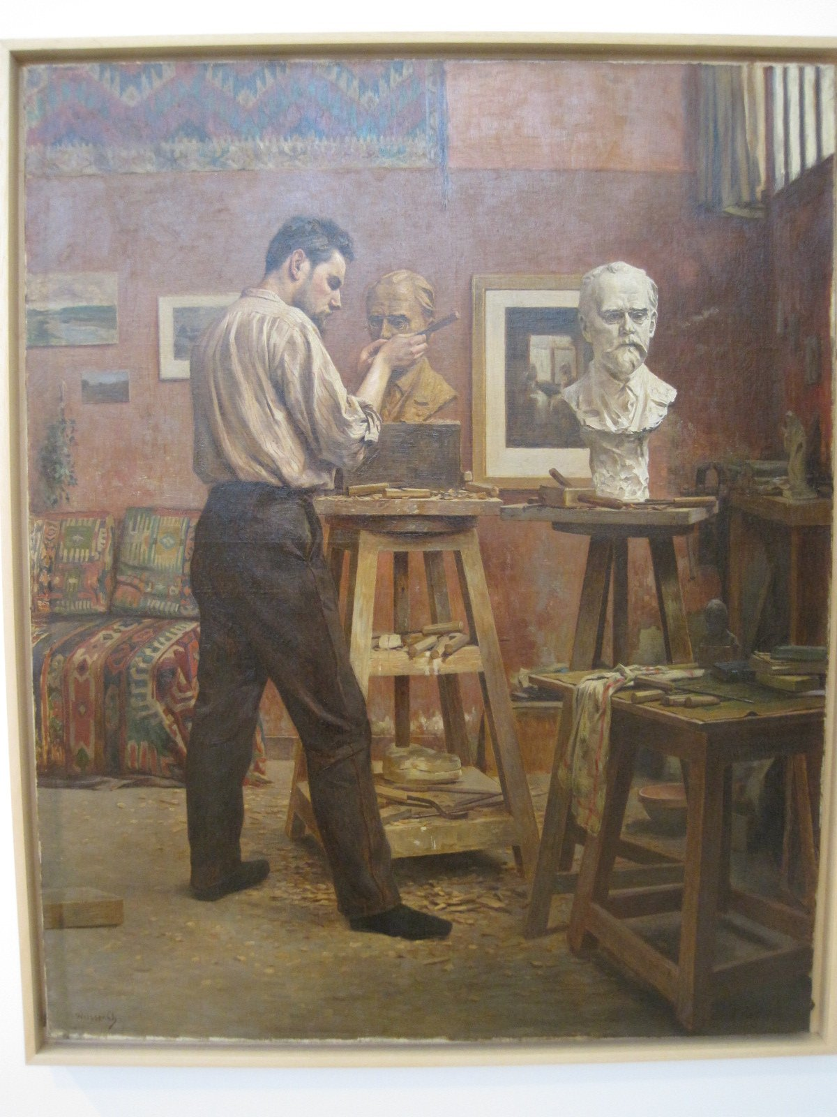 Musée art Montbéliard - Le sculpteur Armand Bloch dans son atelier réalisée par le peintre Charles Weiss